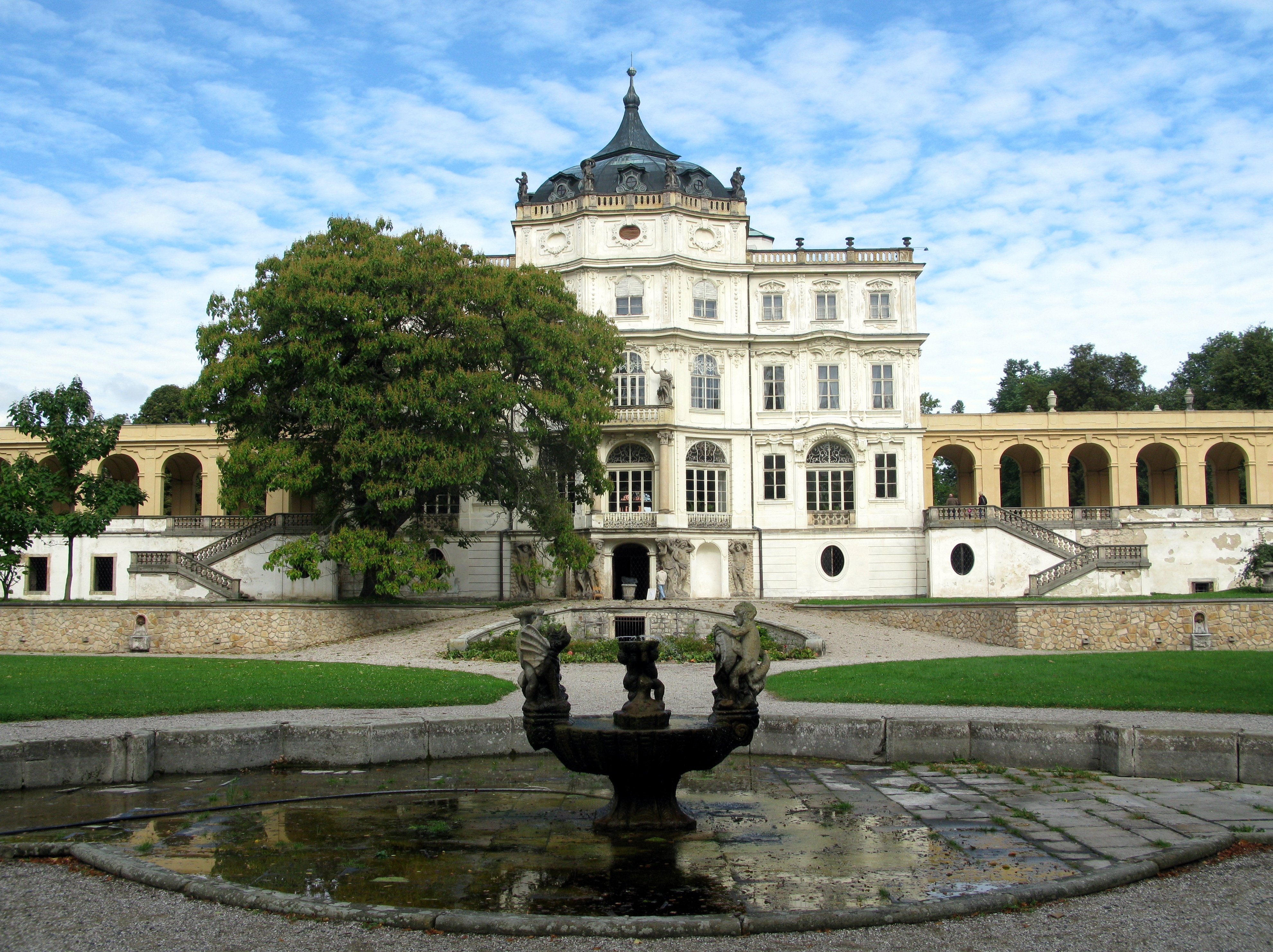 Pohled ze zámecké zahrady